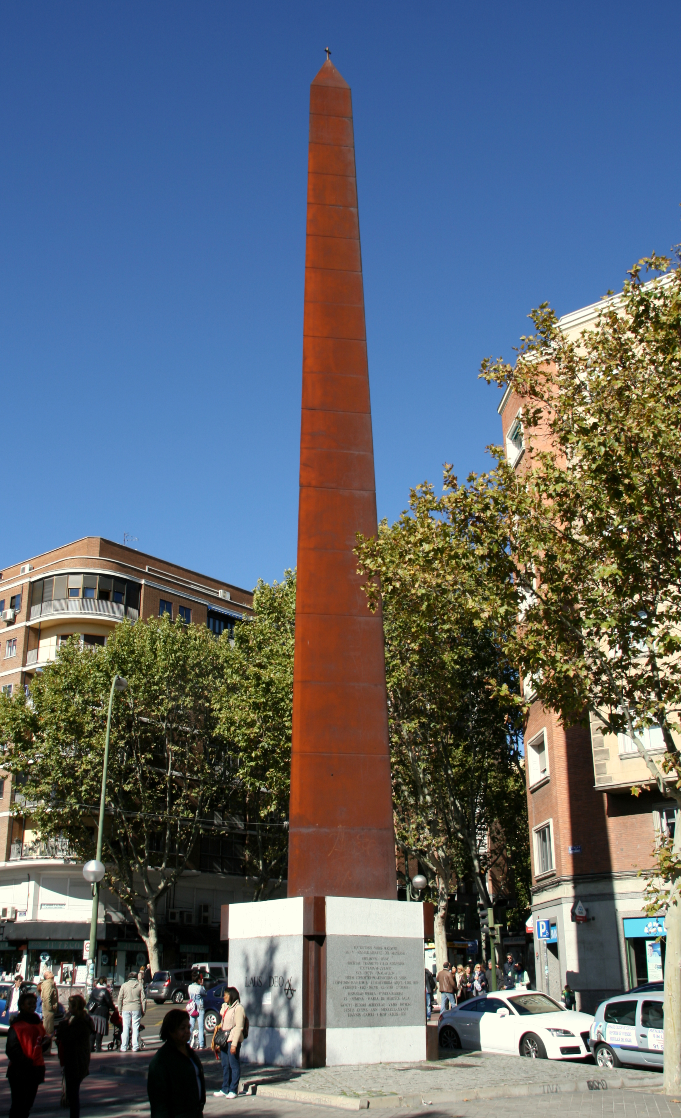 Obelisco Laus Deo del Pasillo Verde Ferroviario en Madrid, diseñado por el arquitecto Manuel Ayllón. Esquina entre el Paseo de Delicias y la calle Bustamante